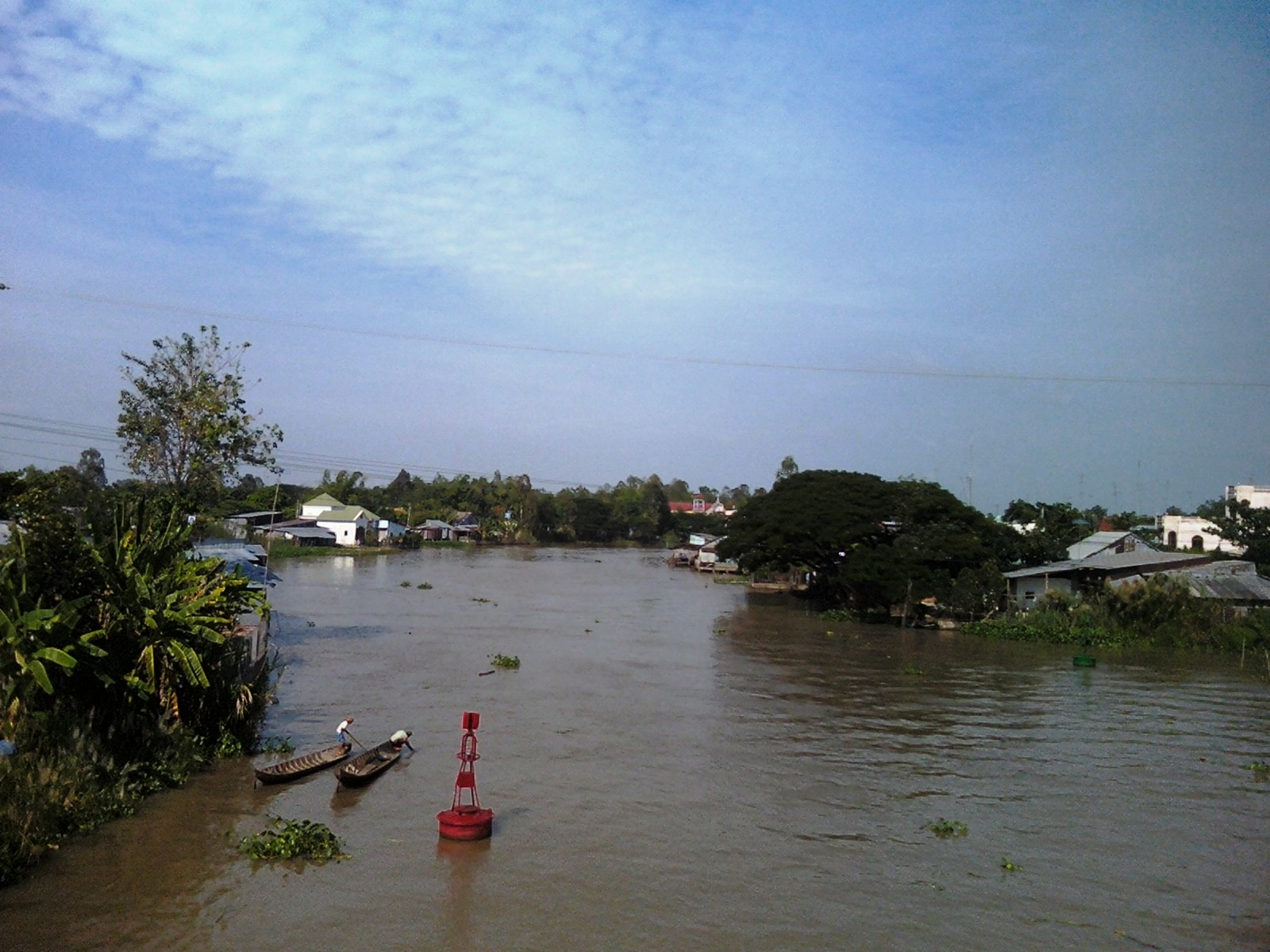 Vị trí Tam Khê ngày nay (thuộc huyện Thoại Sơn, tỉnh An Giang, Việt Nam). Đây là chỗ Trấn thủ Thoại Ngọc Hầu cho khởi đào để nối rạch Đông Xuyên (An Giang) với ngọn Giá Khê (Kiên Giang) vào năm 1818.